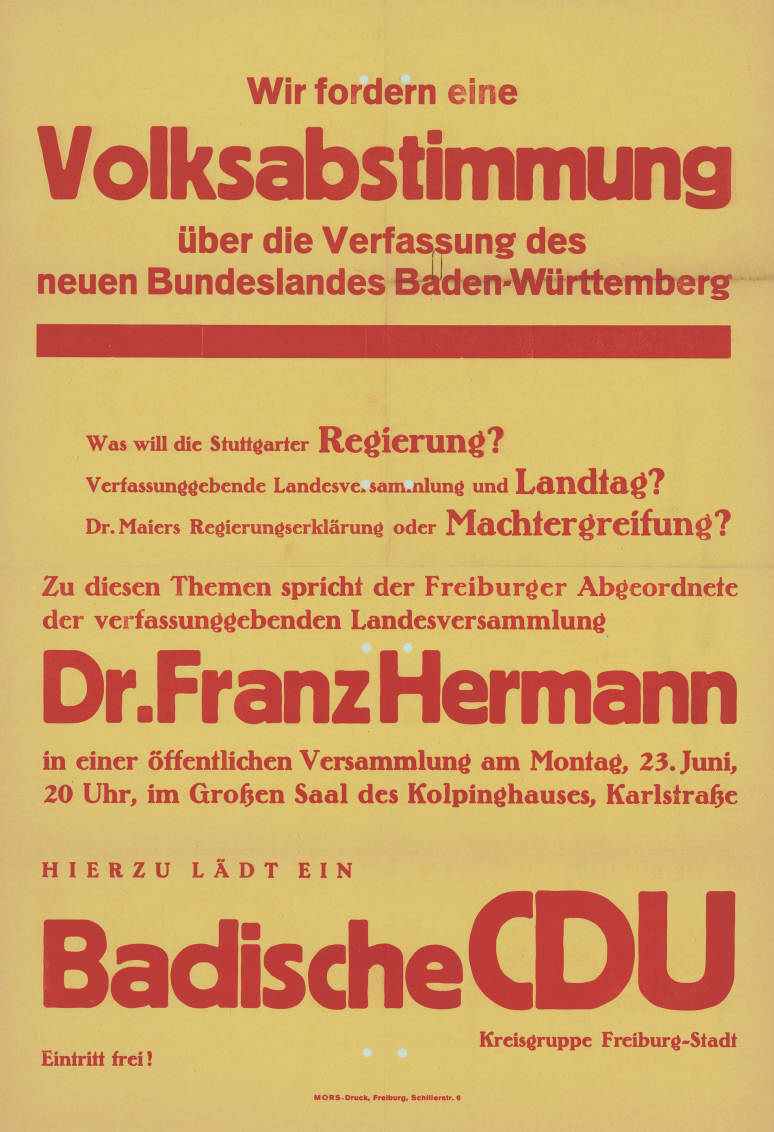 Wir fordern eine Volksabstimmung über die Verfassung des neuen Bundeslandes Baden-Württemberg Was will die Stuttgarter Regierung? Verfassunggebende Landesversammlung und Landtag? Dr. Maiers Regierungserklärung oder Machtergreifung? Zu diesen Themen spricht der Freiburger Abgeordnete der verfassunggebenden Landesversammlung Dr. Franz Hermann ... Hierzu lädt ein Badische CDU Kreisgruppe Freiburg-Stadt Eintritt frei Plakatart: Ankündigungsplakat Auftraggeber: Badische CDU, Kreisgruppe Freiburg-Stadt Drucker_Druckart_Druckort: MORS-Druck, Freiburg Objekt-Signatur: 10-002 :124 Bestand: Landtagswahlplakate Baden-Württemberg (10-002) GliederungBestand10-18: Landtagswahlplakate Baden-Württemberg (10-002) » CDU Lizenz: KAS/ACDP 10-002 :124 CC-BY-SA 3.0 DE